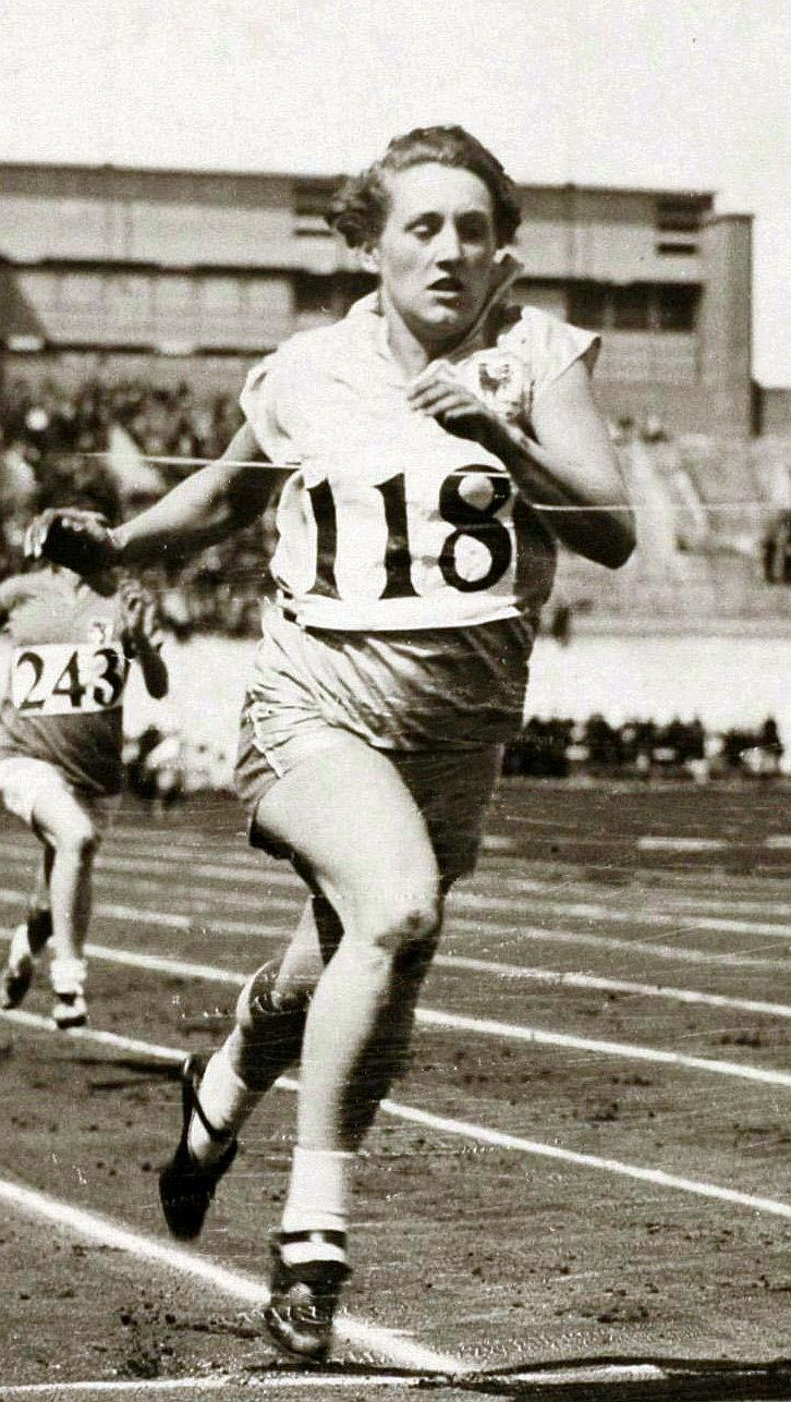 Sport. Olympische Spelen 1928 Amsterdam, Nederland. Atletiek. De Franse Georgette Gagneux wint in 13.0 sec de 5e serie 100 meter hardlopen dames.